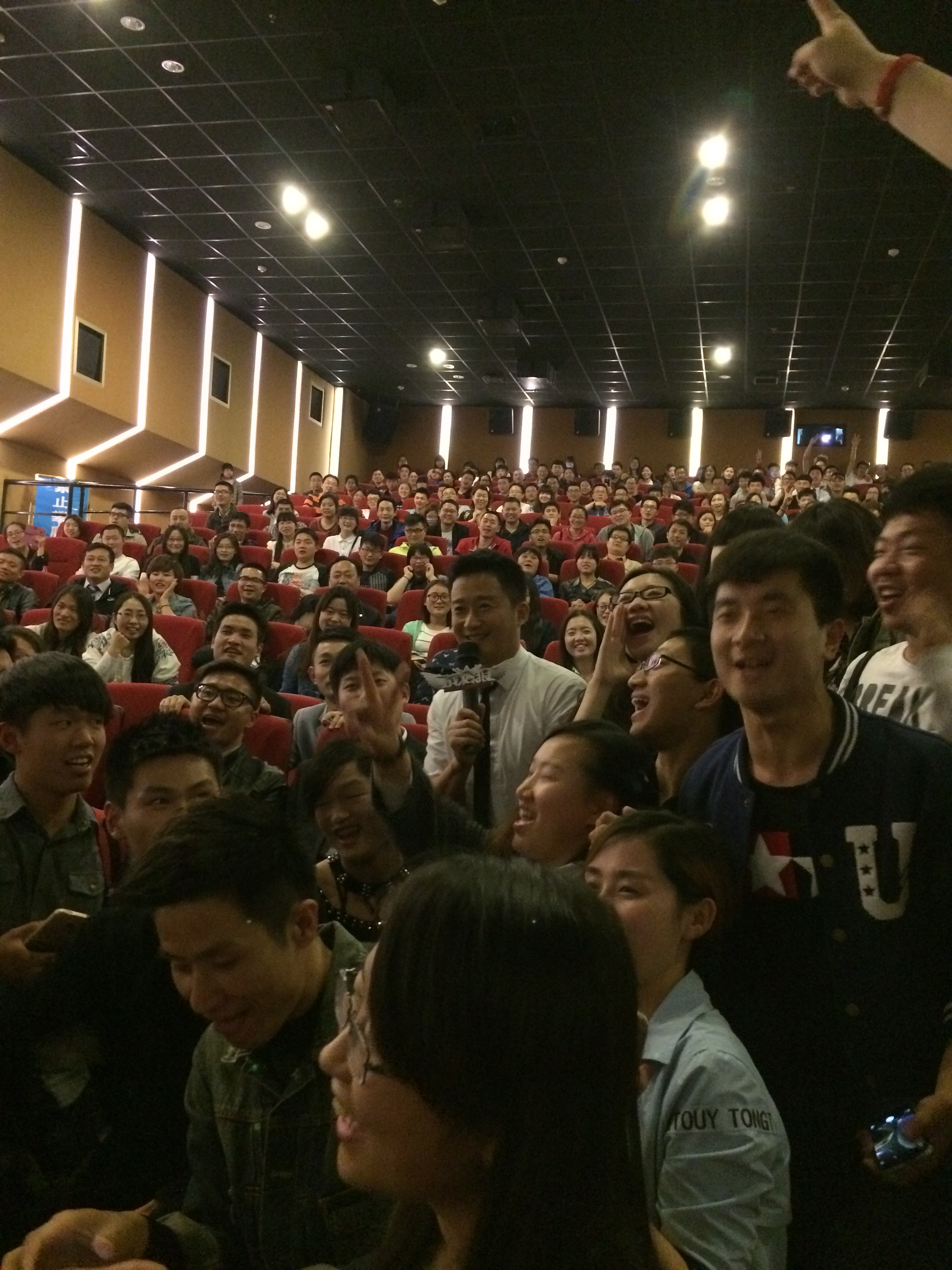 2015年，吴京在电影《战狼》南京的宣传活动中，摄于南京金陵工人影城